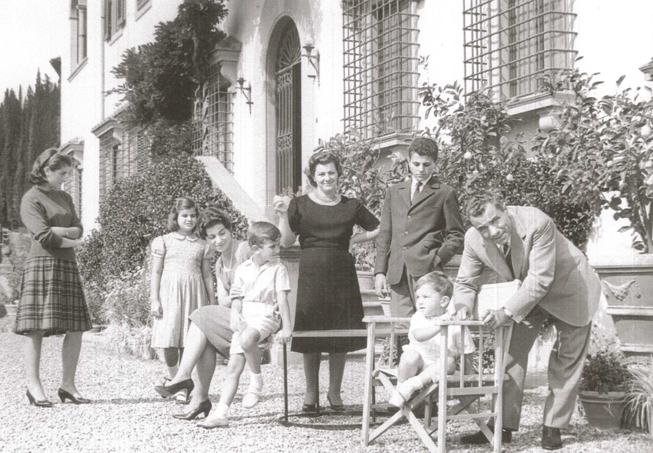 Salvatore e Wanda Ferragamo con i figli Fiamma, Ferruccio, Giovanna, Fulvia, Leonardo e Massimo